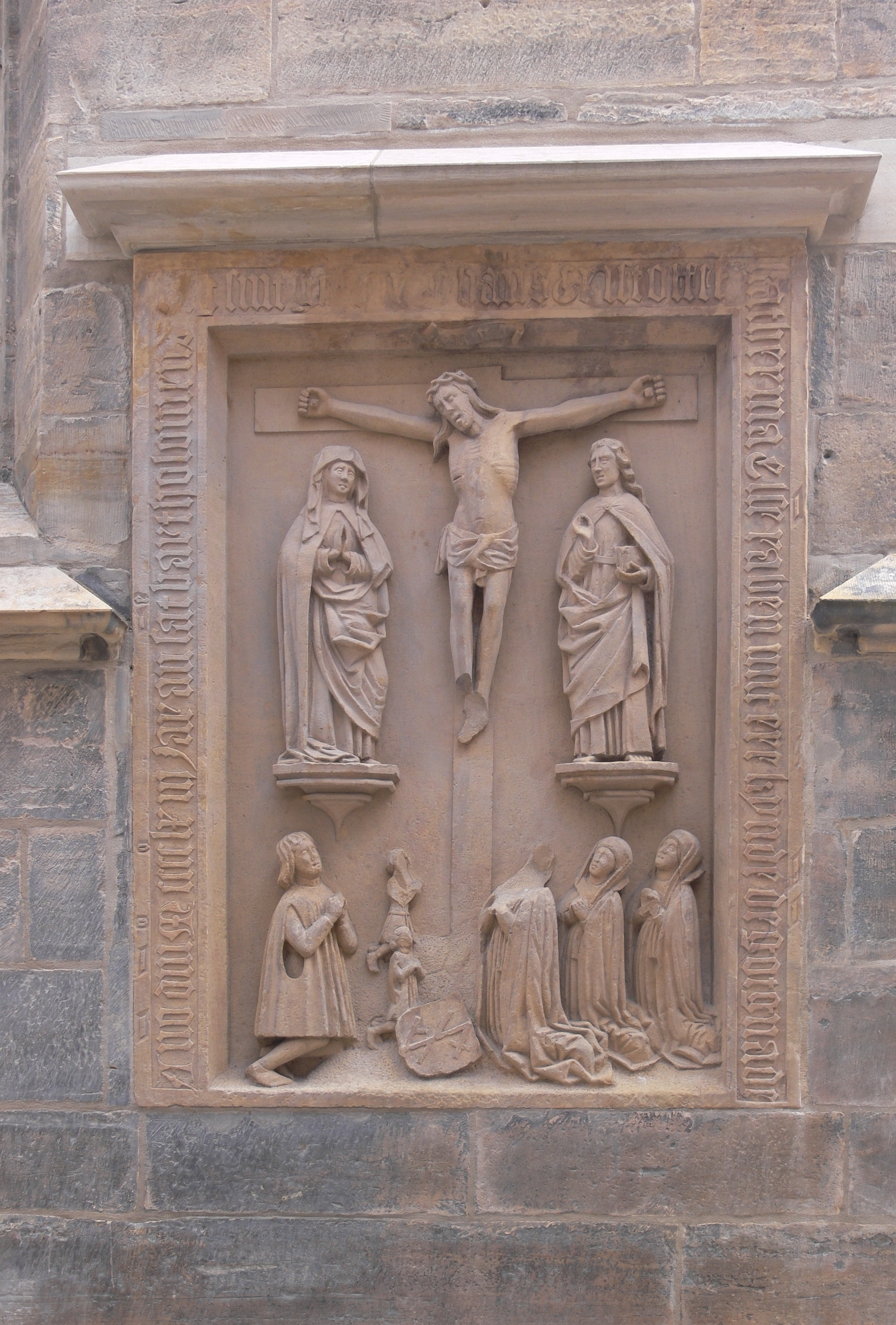 Erfurt, Anger 80, Kaufmannskirche St. Gregorius Epitaph des Hans Christoffel und seiner Frau, 1463